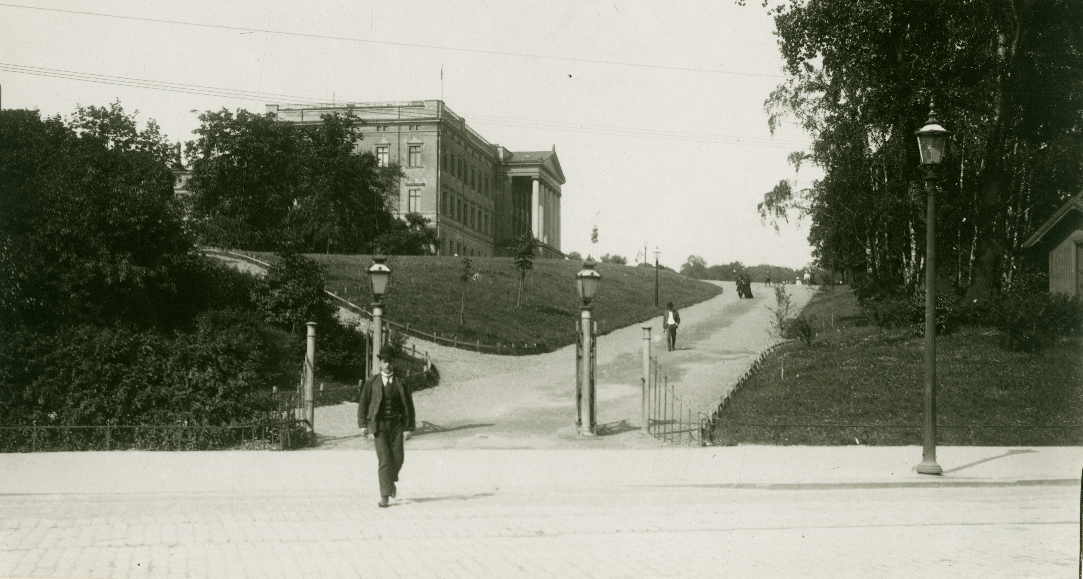 Slottet i Oslo, Oslo